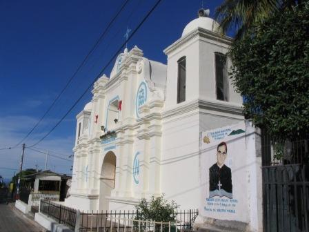 Iglesia de Conchagua